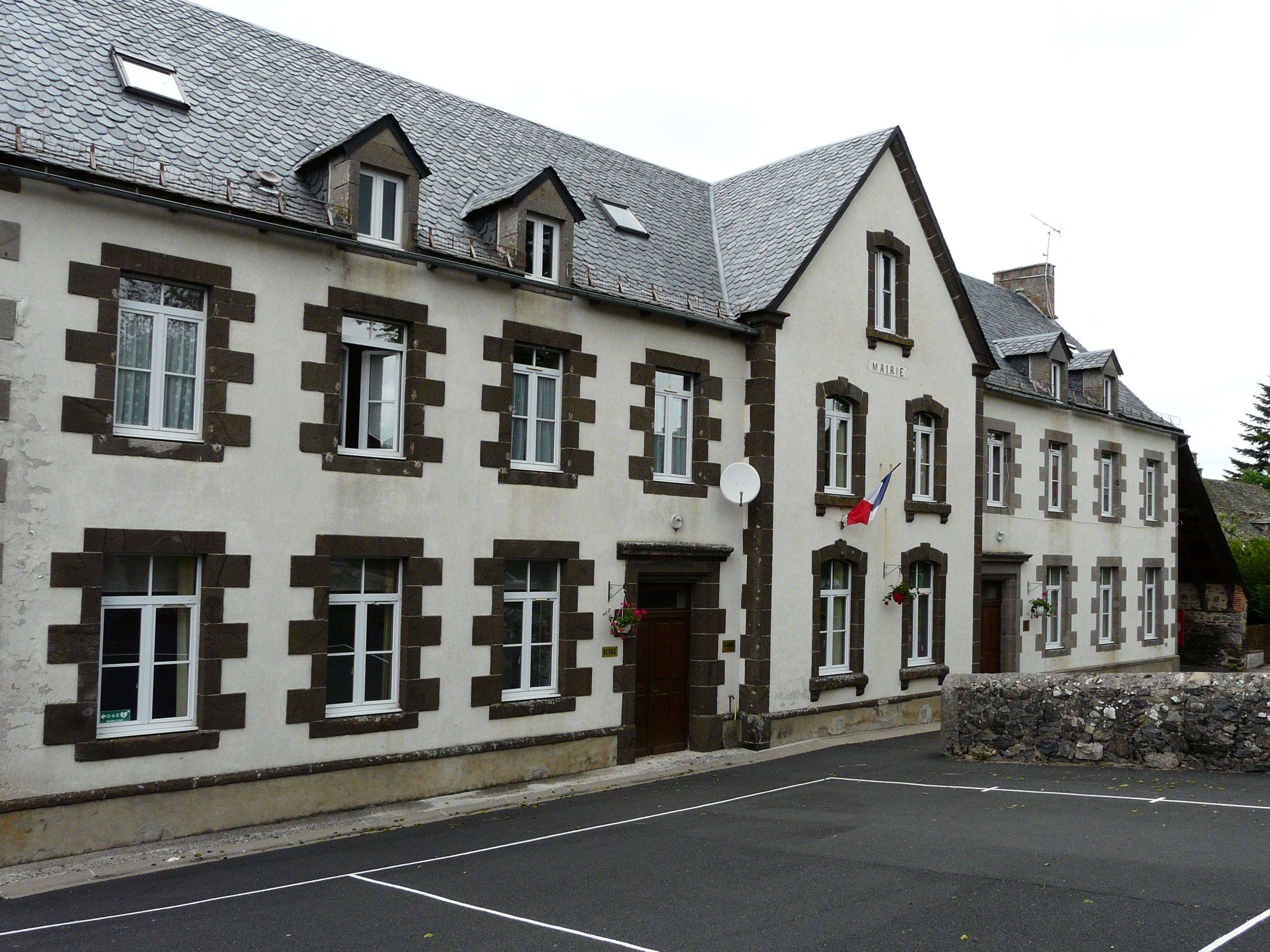 La mairie de Lugarde, Cantal, France.